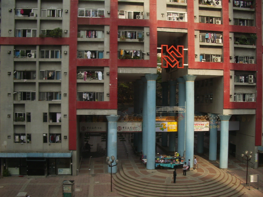 Kwun Tong Garden Estate Lotus Towers , Ngau Tau Kok Road,Ngau Tau Kok, Kwun Tong, Kowloon, Hong Kong